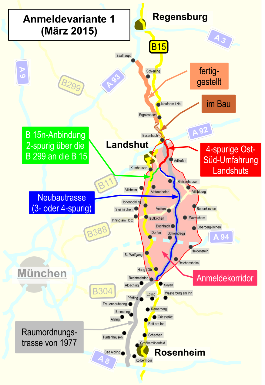 BVWP 2015-Anmeldetrasse für B 15n - Variante 1 / Projekt B015-G060-BY